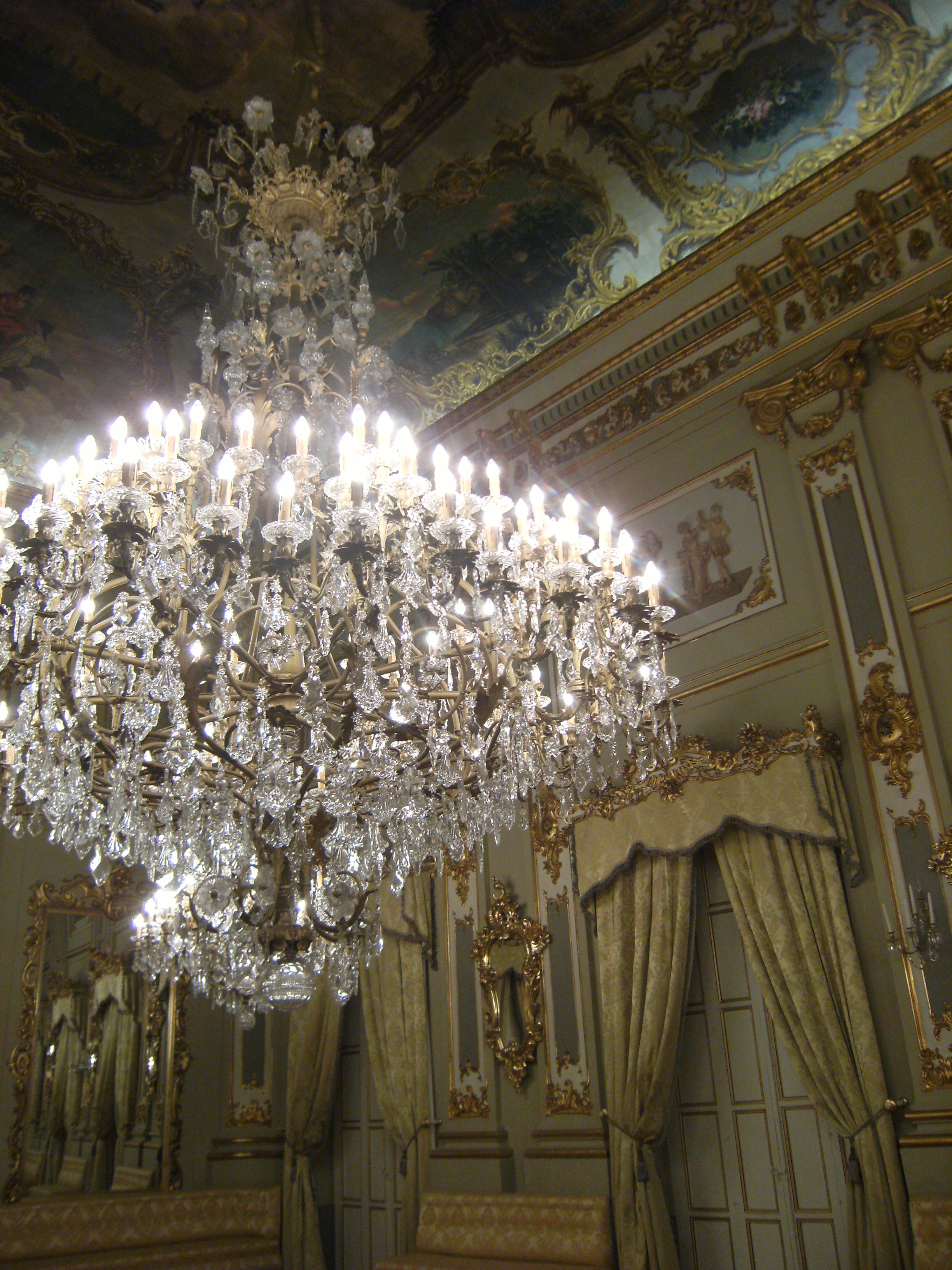 Detalle del Salón de Baile del Casino de Murcia (España). Datado en 1875.